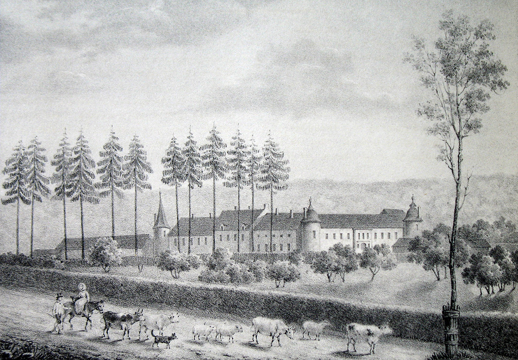 Das Schloss Arville in Gesves